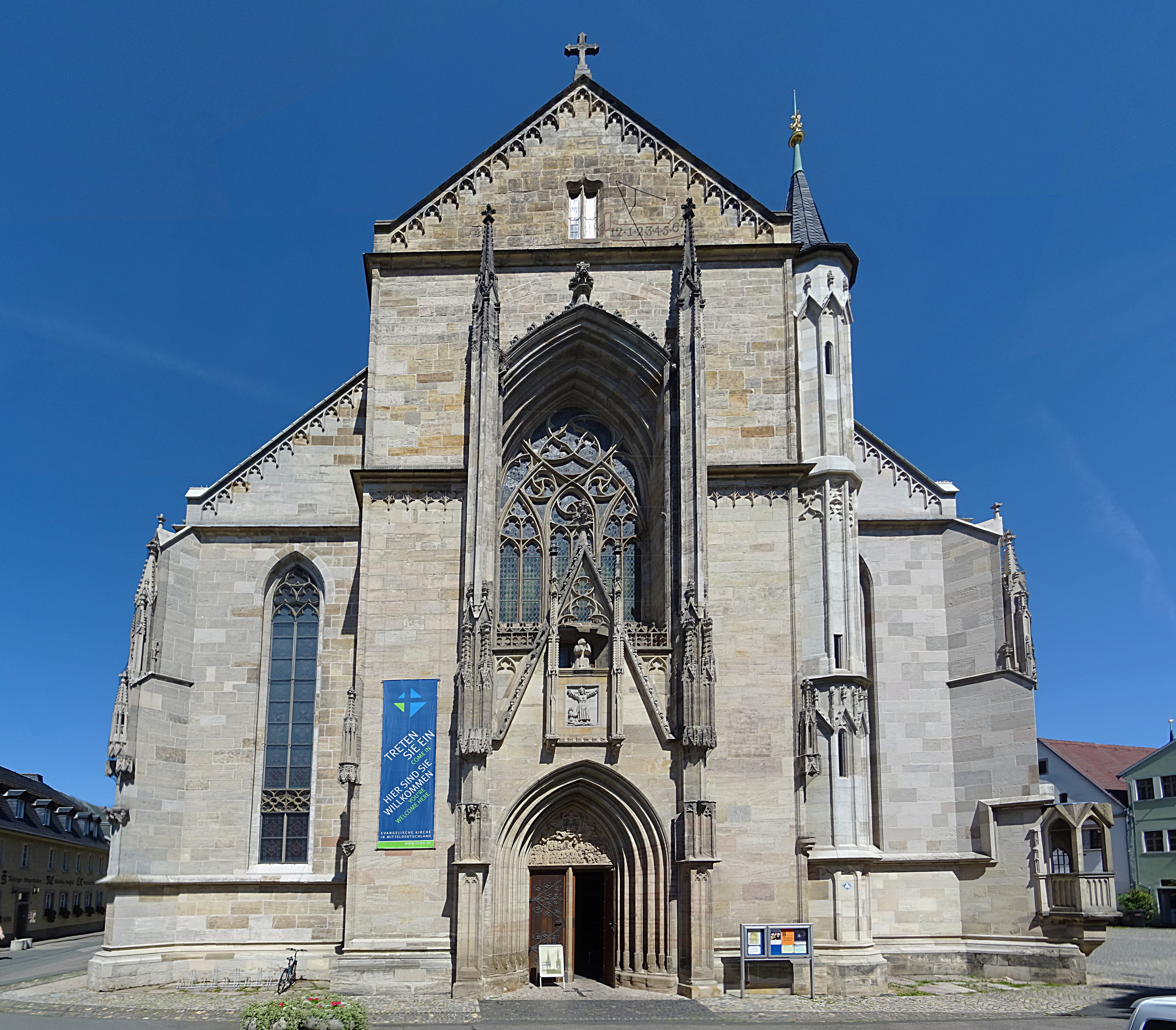 Johanneskirche Saalfeld, Ansicht von Westen